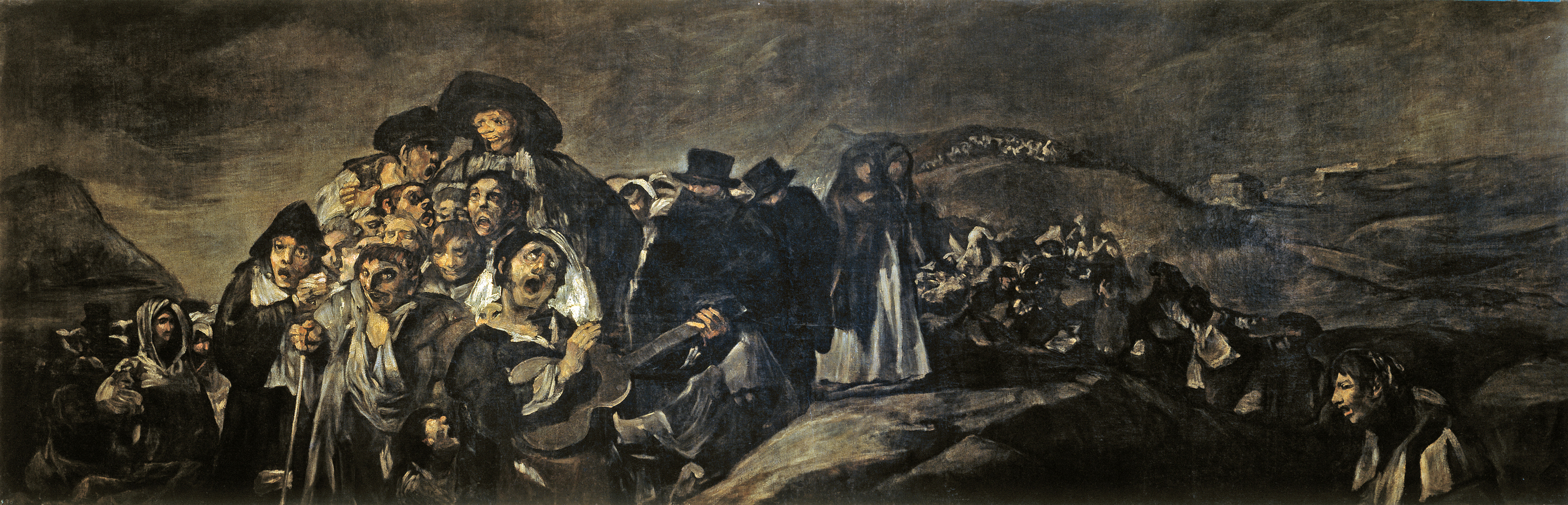 La romería de San Isidro. Óleo sobre muro trasladado a lienzo. 140 x 438